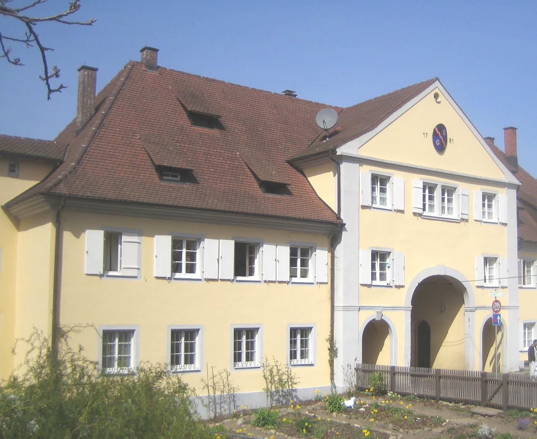 Torbau des ehemaligen Zisterzienserinnen Klosters Günterstal mit dem Wappen des Klosters